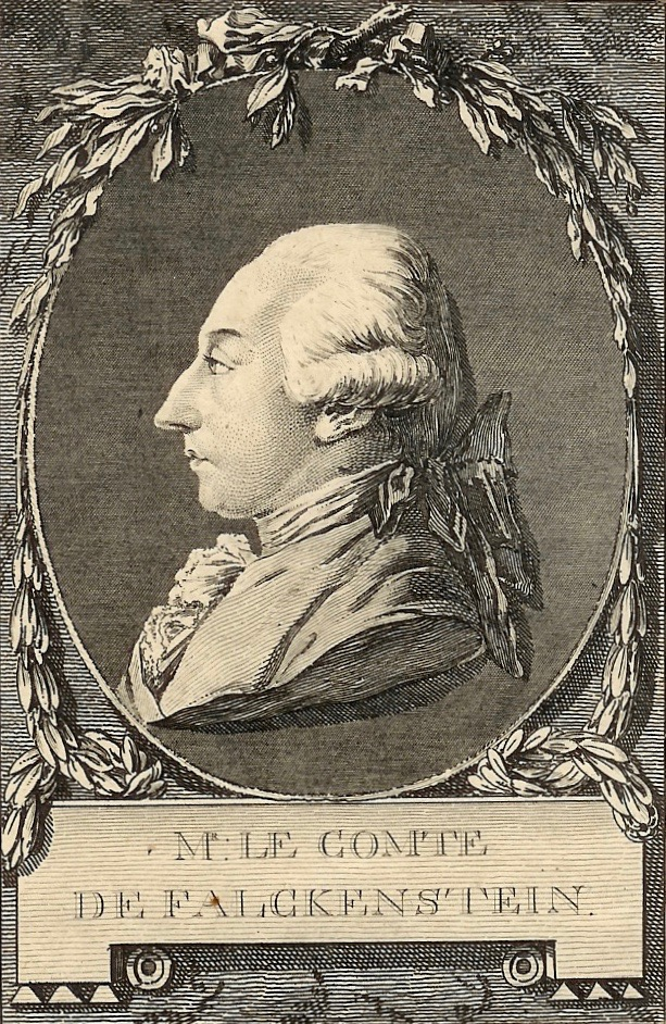 Unbekannter Stecher: "M(onsieu)r le comte de Falckenstein." Kaiser Joseph II. von Österreich-Lothringen (1765–1790) inkognito als Graf von Falkenstein auf seiner Reise nach Frankreich, 1777.